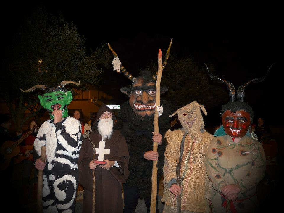 Dimonis